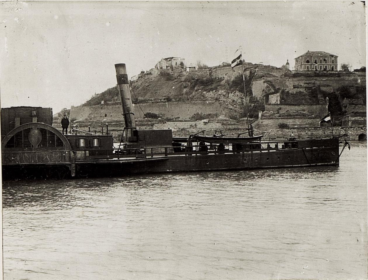 Belgrad, Kalemegdan unmittelbar nach der Einnahme.